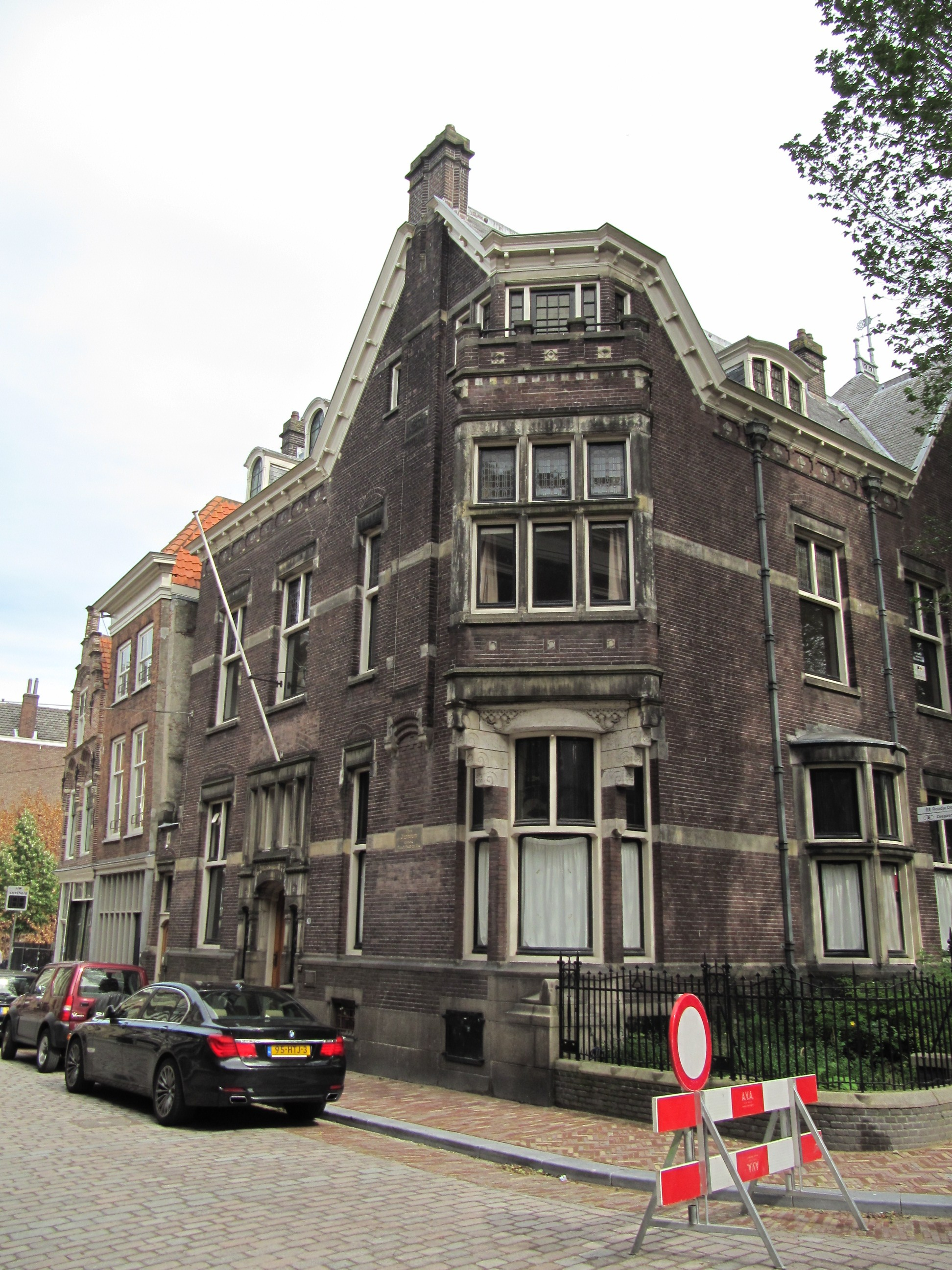 RM522345 Dordrecht - Wijnstraat 134.jpg